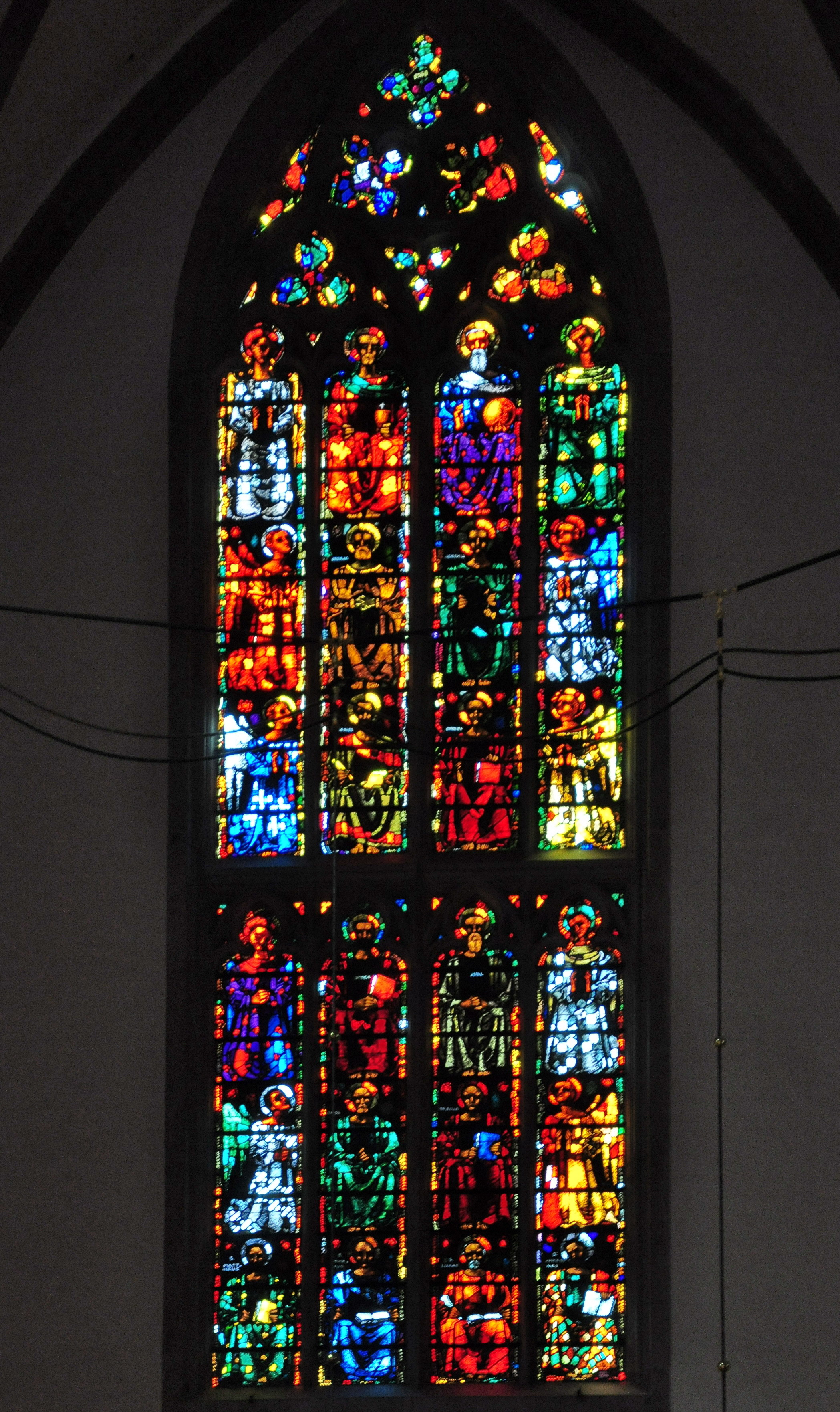 Giacometti-Fenster, Fraumünster in Zürich (Switzerland)